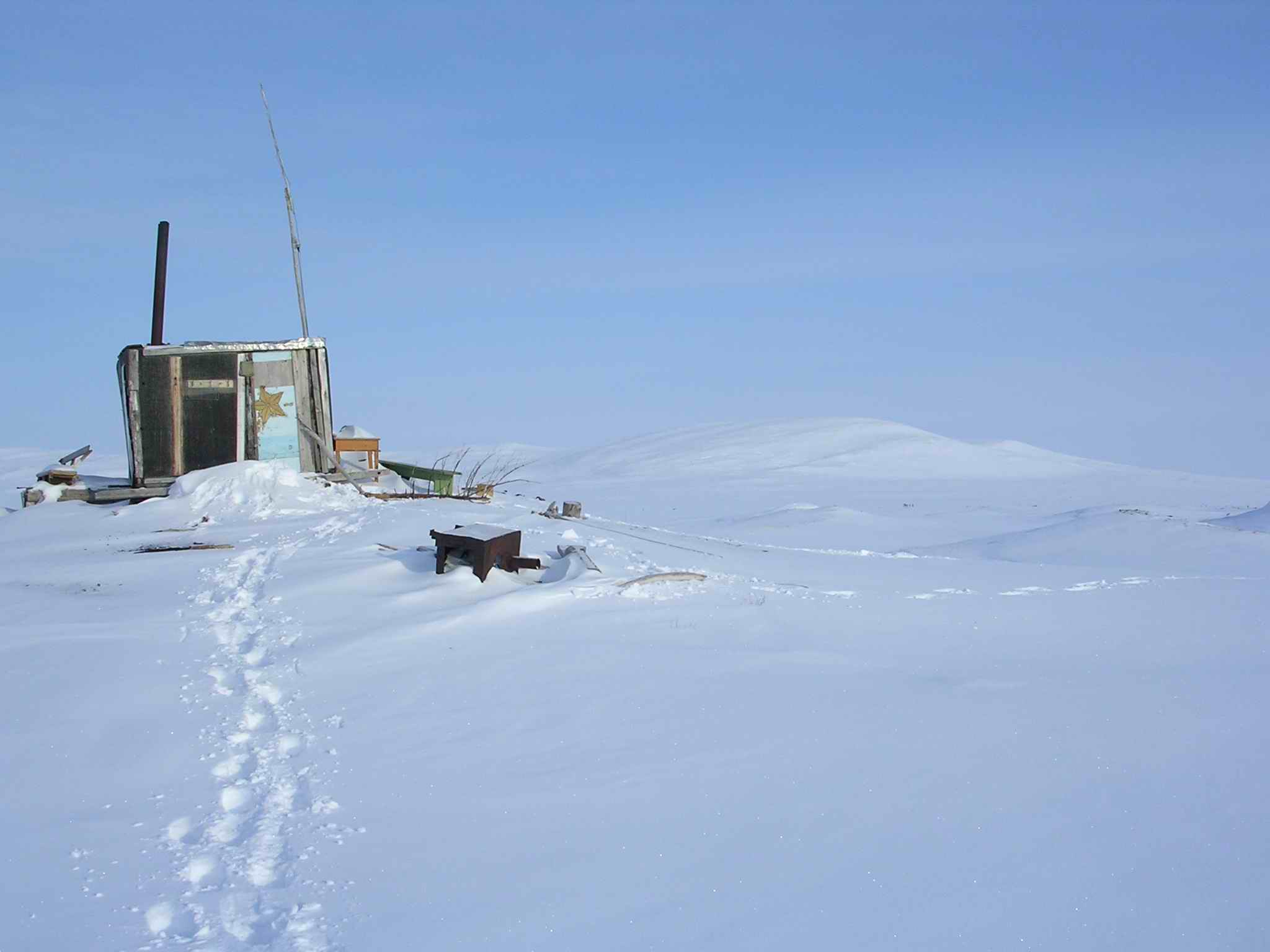 Балок